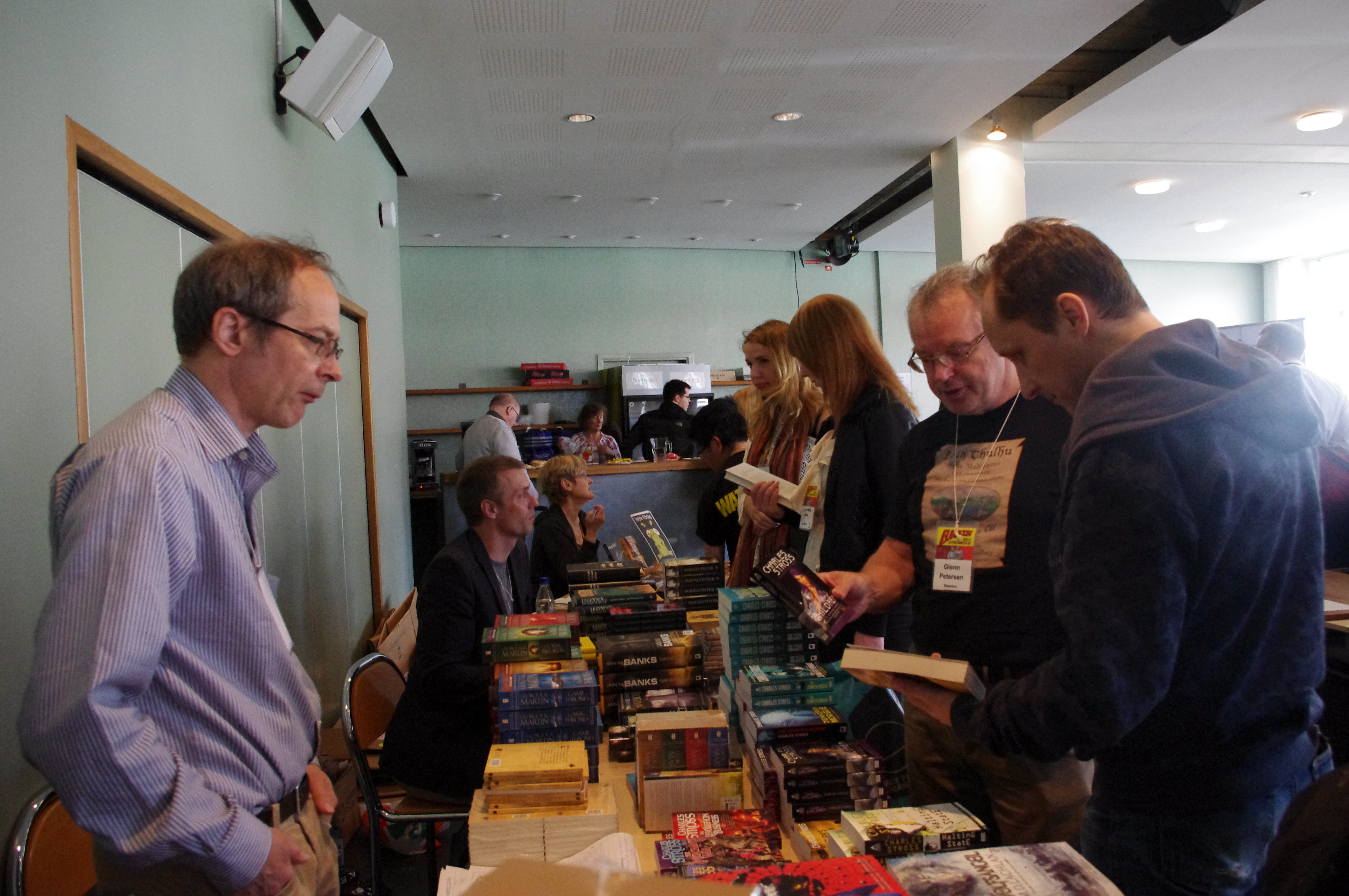 Science Fiction-Bokhandelns Jörgen Forsberg (närmast i bild till vänster) säljer böcker på Eurocon i Stockholm, 2011. På andra sidan bordet står serietecknaren Kim W Andersson (längst till höger) och Glenn Petersen, från bokhandelns butik i Göteborg.